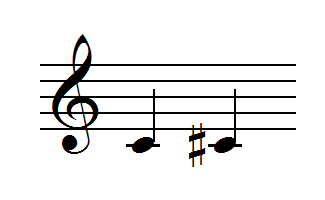 Notskrift, överstigande prim